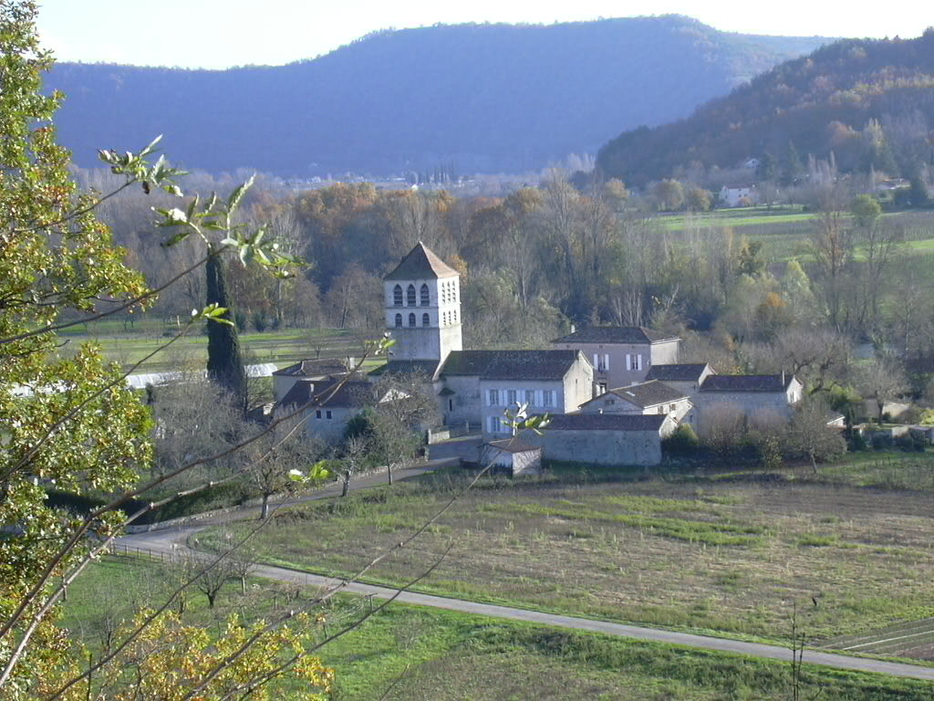 Vue de Caillac